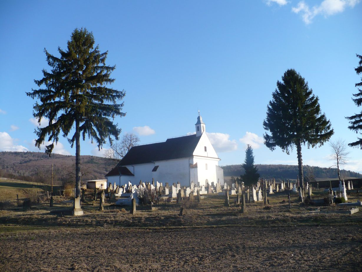 A haralyi római katolikus templom és temető